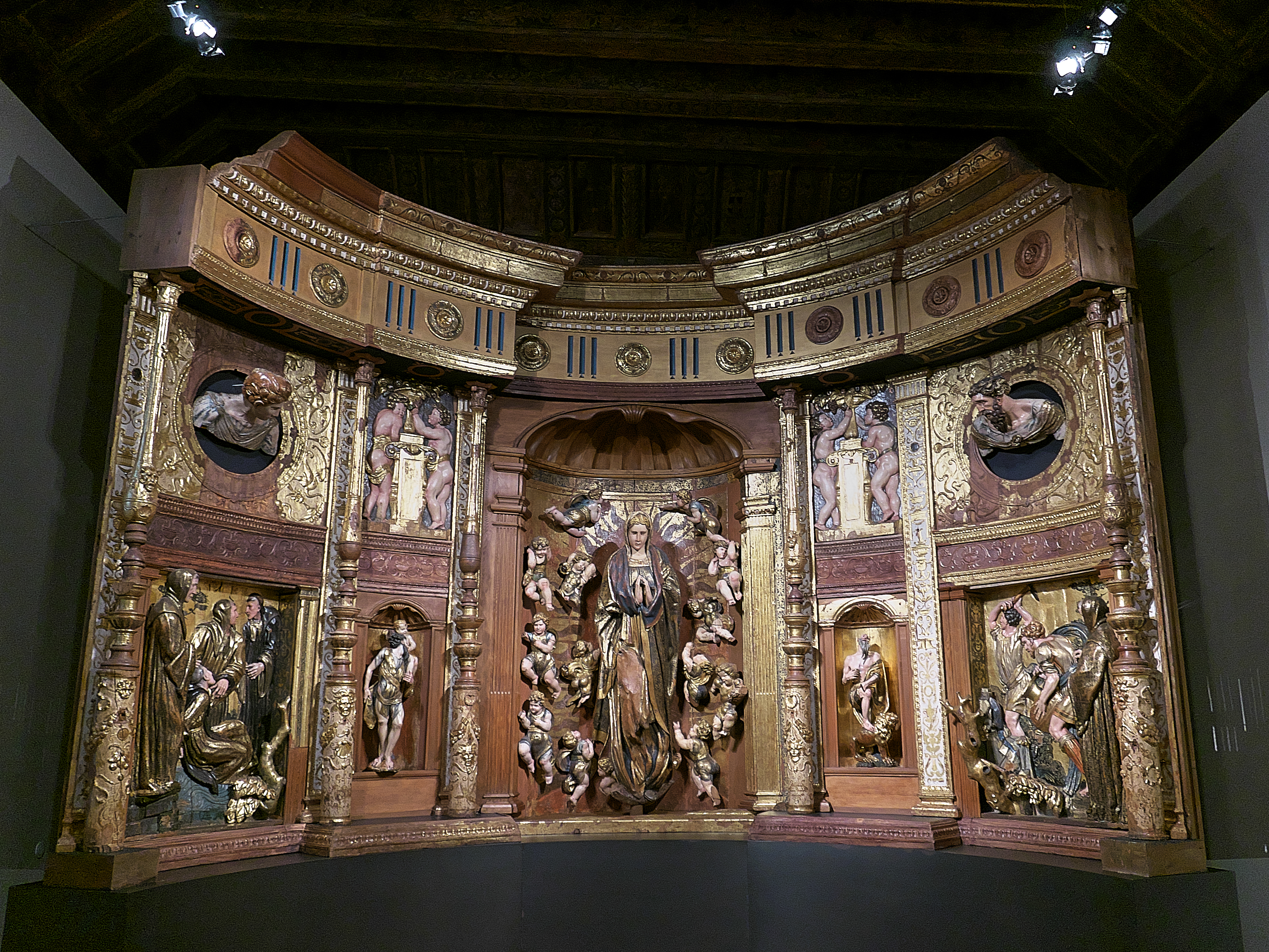 Museo Nacional de Escultura. Segundo cuerpo del Retablo de San Benito el Real (Valladolid), dedicado a la Asunción de María.